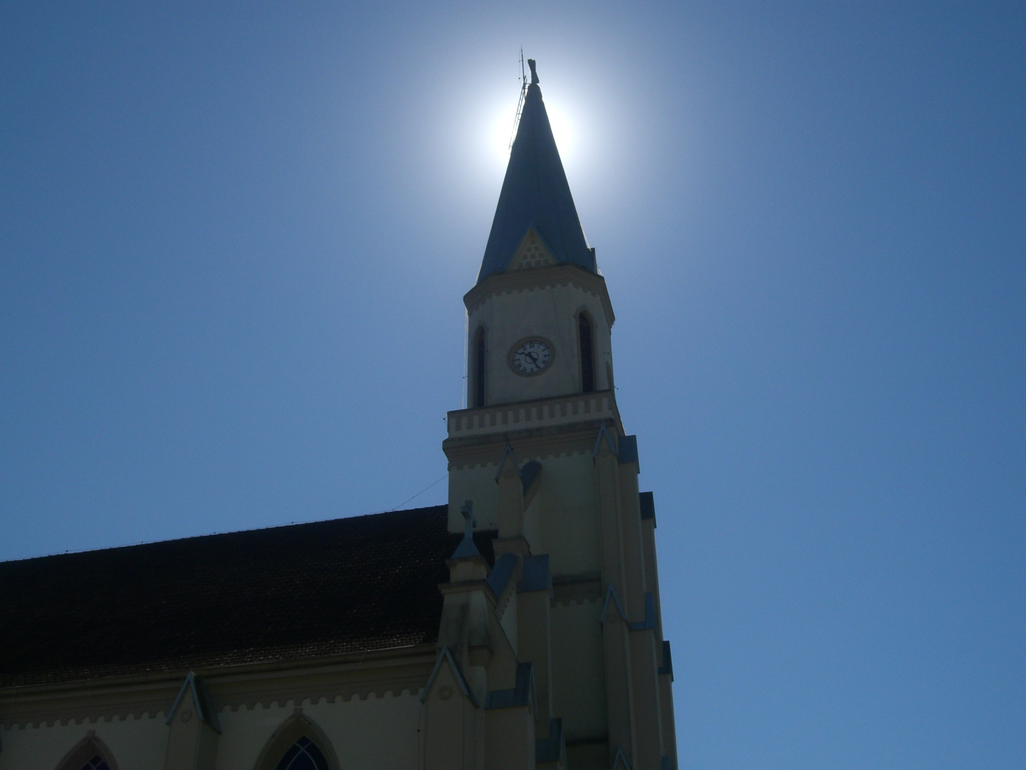 Igreja matriz (church/Kirche/église/chiesa) de Santo Amaro da Imperatriz